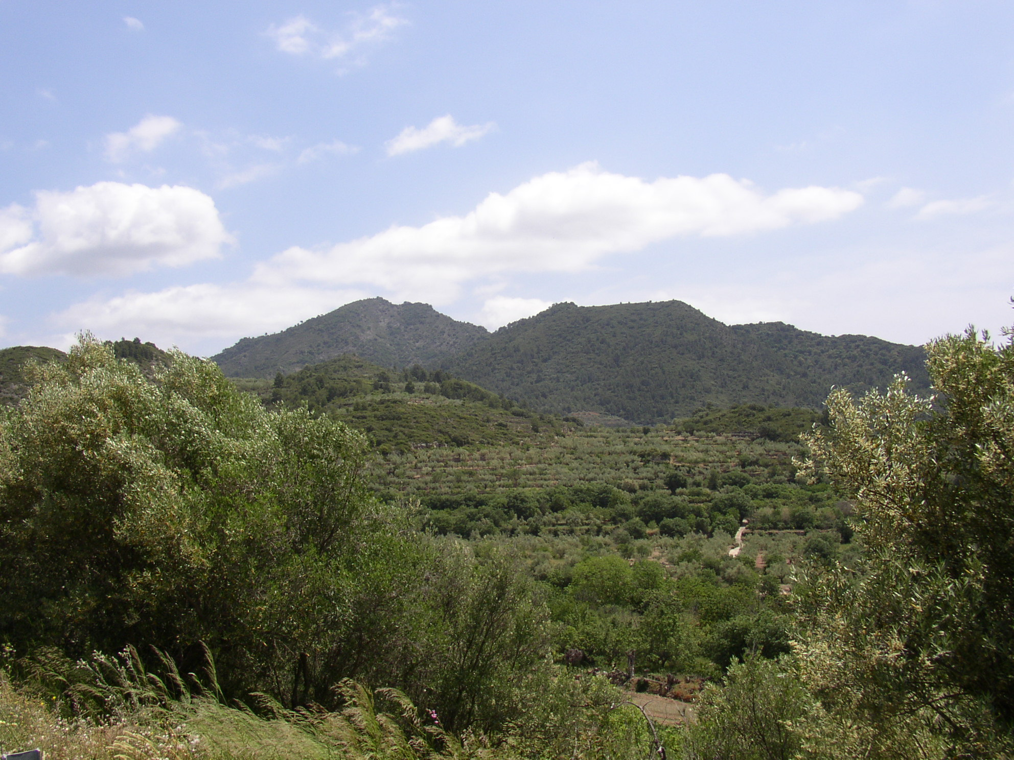 Castellón (Comunidad Valenciana) España. Algimia de Almonacid. Sierra de Espadán. Fotografía realizada el 19 mayo de 2006 por el autor User: Pelayo2